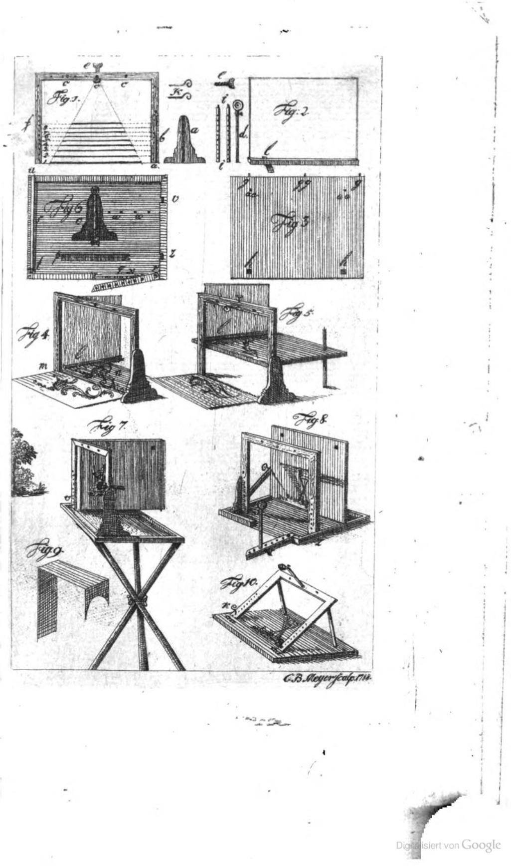 Beschreibung eines Transparentspiegels um Objekte vergrößert oder verkleinert zeichnen zu können. Eine Erfindung von C.B.Meyer